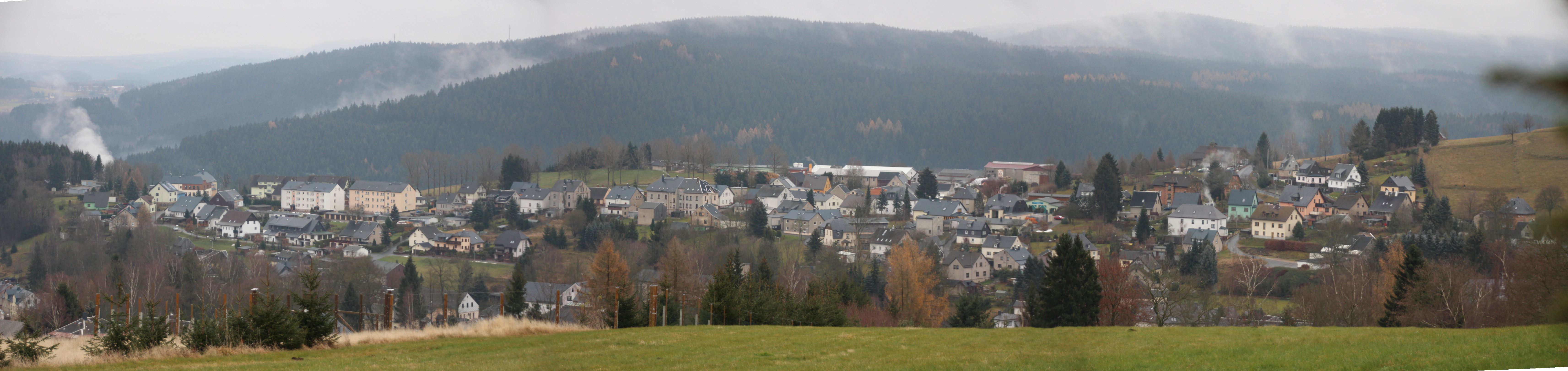 Schönheide im Erzgebirge: Ortsteil Schädlichsberg von der baumlosen Erhebung in der Ortsmitte Allee, früher auch Oberförsterknock genannt (684 Meter), aus. Der Schädlichsberg liegt auf einem plateauartigen, nach Osten abfallenden Sporn mit West-Ost-Verlauf zwischen dem Dorfbach, an dem sich das Dorf in seinem langgestreckten Hauptteil hinzieht, und der Zwickauer Mulde. Dieser Sporn ist ein Ausläufer des Berges Knock (725 Meter), der südlich des mittleren Ortsteil liegt. Hinter den Häusern des Ortsteils Schädlichsberg ist deutlich der tiefe Einschnitt des Tals der Zwickauer Mulde zu sehen. Der (linke) östliche Teil des Schädlichsbergs trug früher die Ortsbezeichnung Buchhöhe (erzgebirgisch Guchheh). Er gehörte zum heutigen Schönheider Ortsteil Schönheiderhammer. Etwa in der Mitte des Ortsteils wird das Uttmannsche Vorwerk, das zu Schönheiderhammer gehörte, gelegen haben. Sein indirekter Nachfolger war in der DDR-Zeit die LPG Vorwärts, sie hatte ihre Rinderstallungen, Scheunen und anderen Baulichkeiten in der Mitte des Fotos (flache hellgraue Dächer, z. T. Nachfolgebauten).Rechts am Rand der Berg Knock, im Hintergrund die Berge jenseits der Zwickauer Mulde. Fotografiert vom Berg Allee aus.